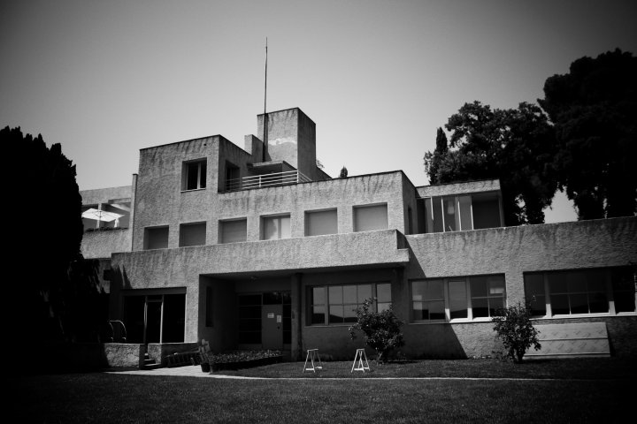 Villa Noailles, Rue Saint-PierreMontée de Noailles (InscritInscrit, 19751987) .